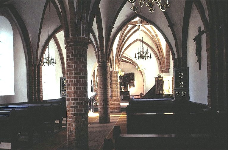 Eggeslevmagle Kirke i Danmark. Skibet set mod øst